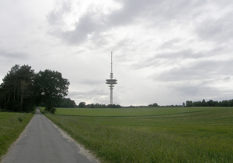 Fernmeldeturm Lamstedt